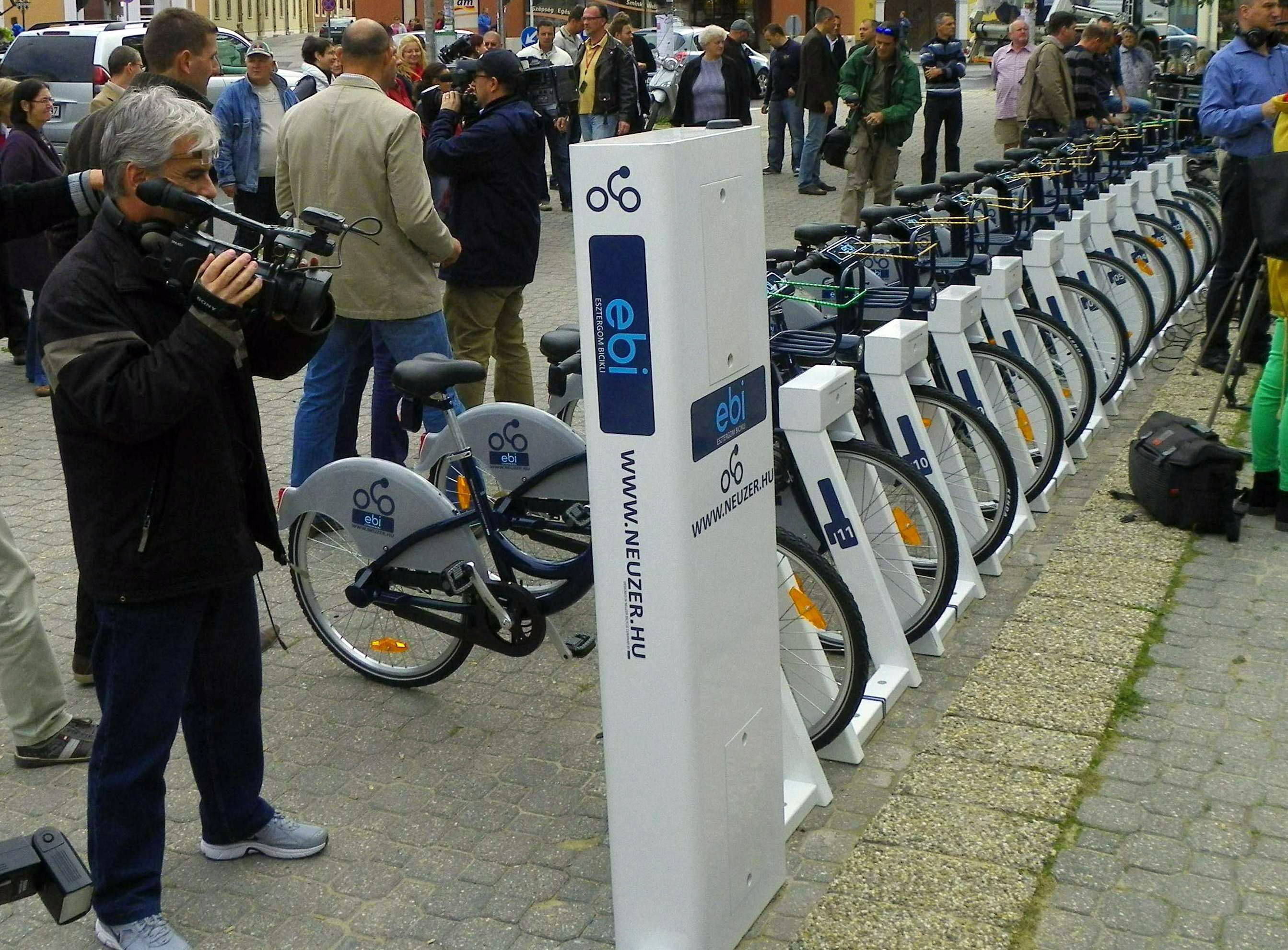 Az ország első közbicikli rendszerének átadása Esztergomban